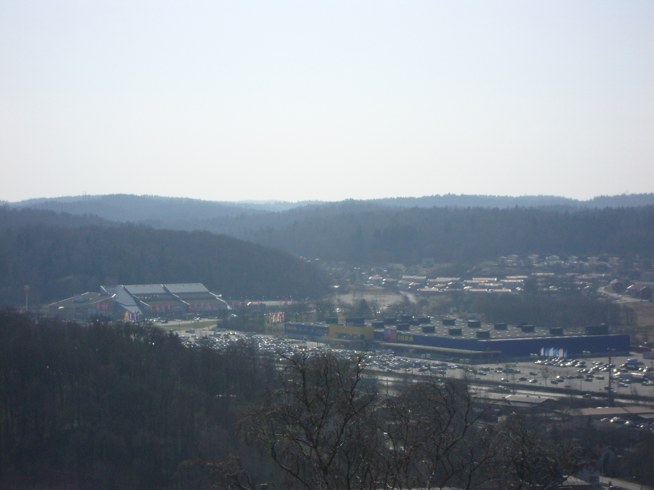 En bild över Kållered Köpstad tagen från höghöjd